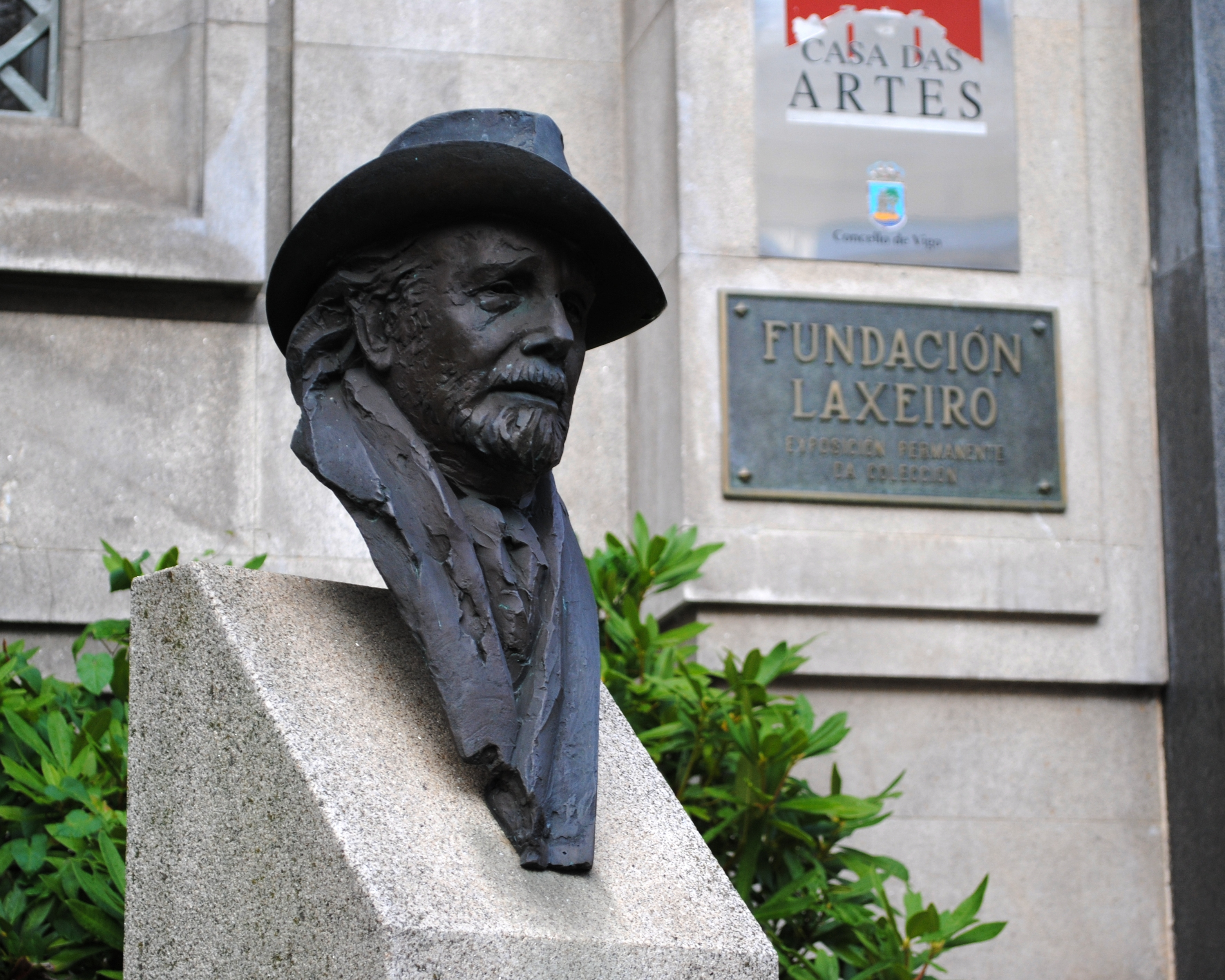 Xosé Otero Abeledo, Laxeiro